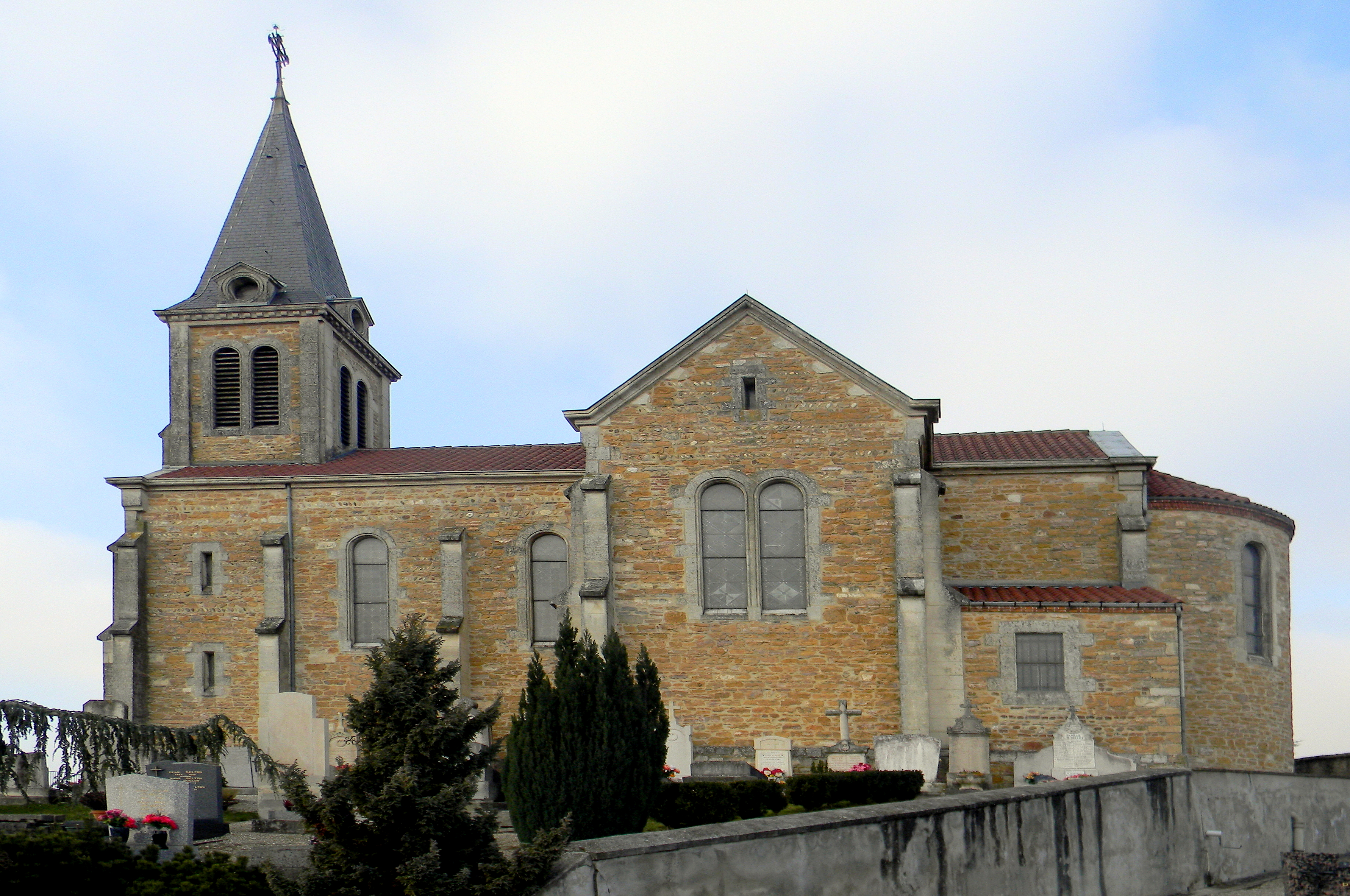 Église de Mionnay, vue depuis le cimetière.